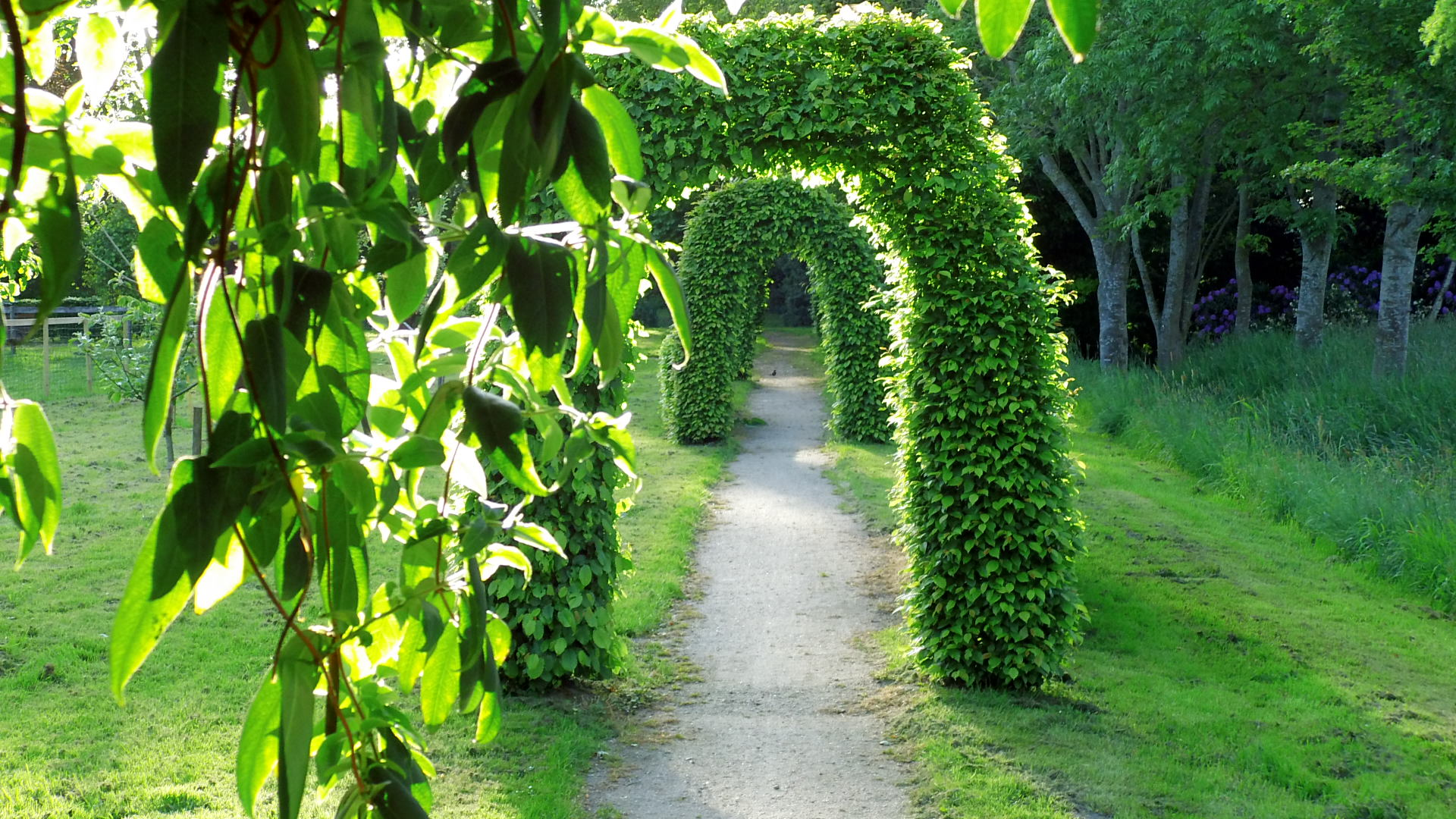 Grünanlage in der Ortschaft Etzel, Gemeinde Friedeburg, Landkreis Wittmund, Niedersachsen, Deutschland